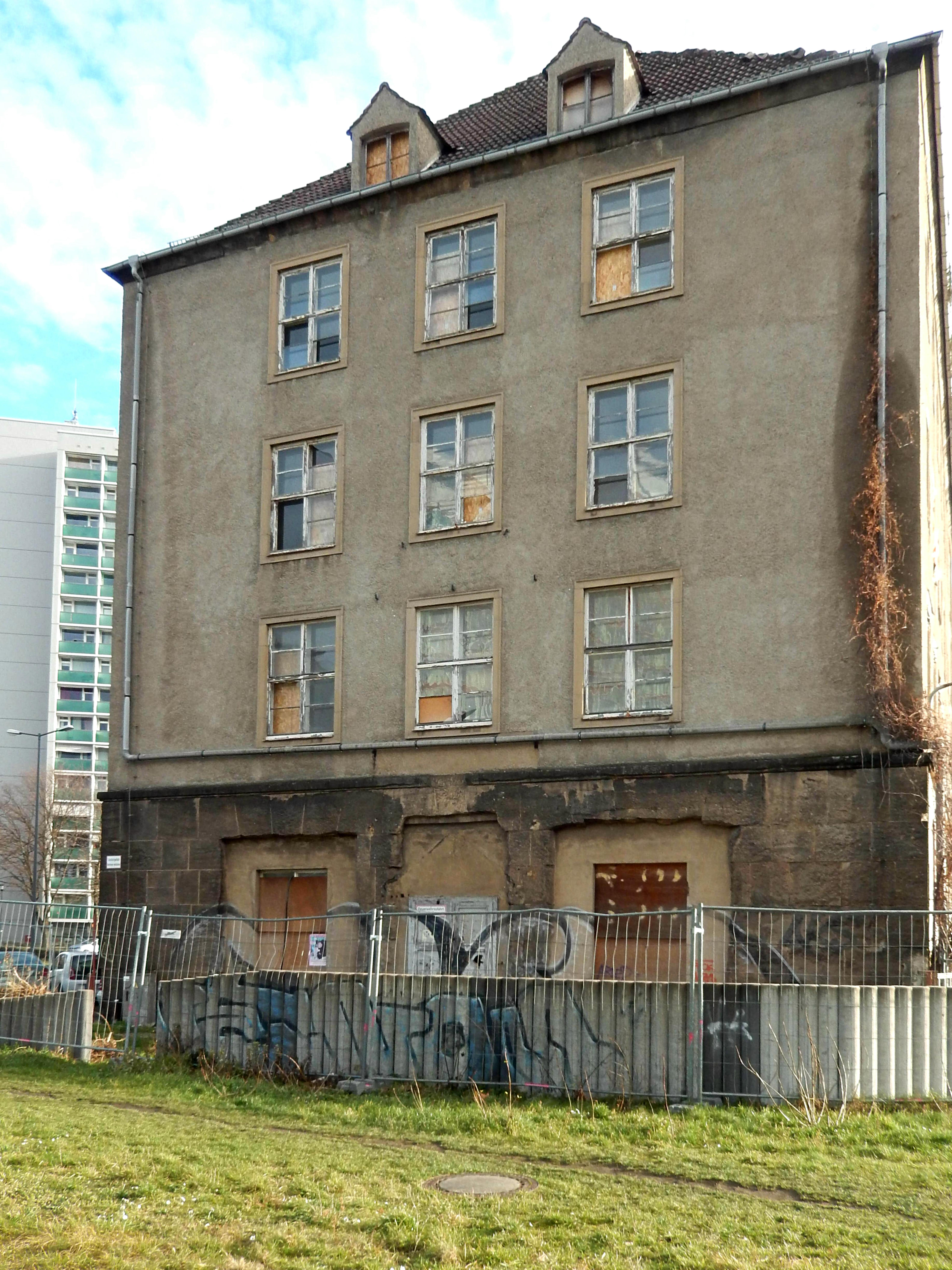 Dresden-Seevorstadt: Siemenshaus Sidonienstraße 18.